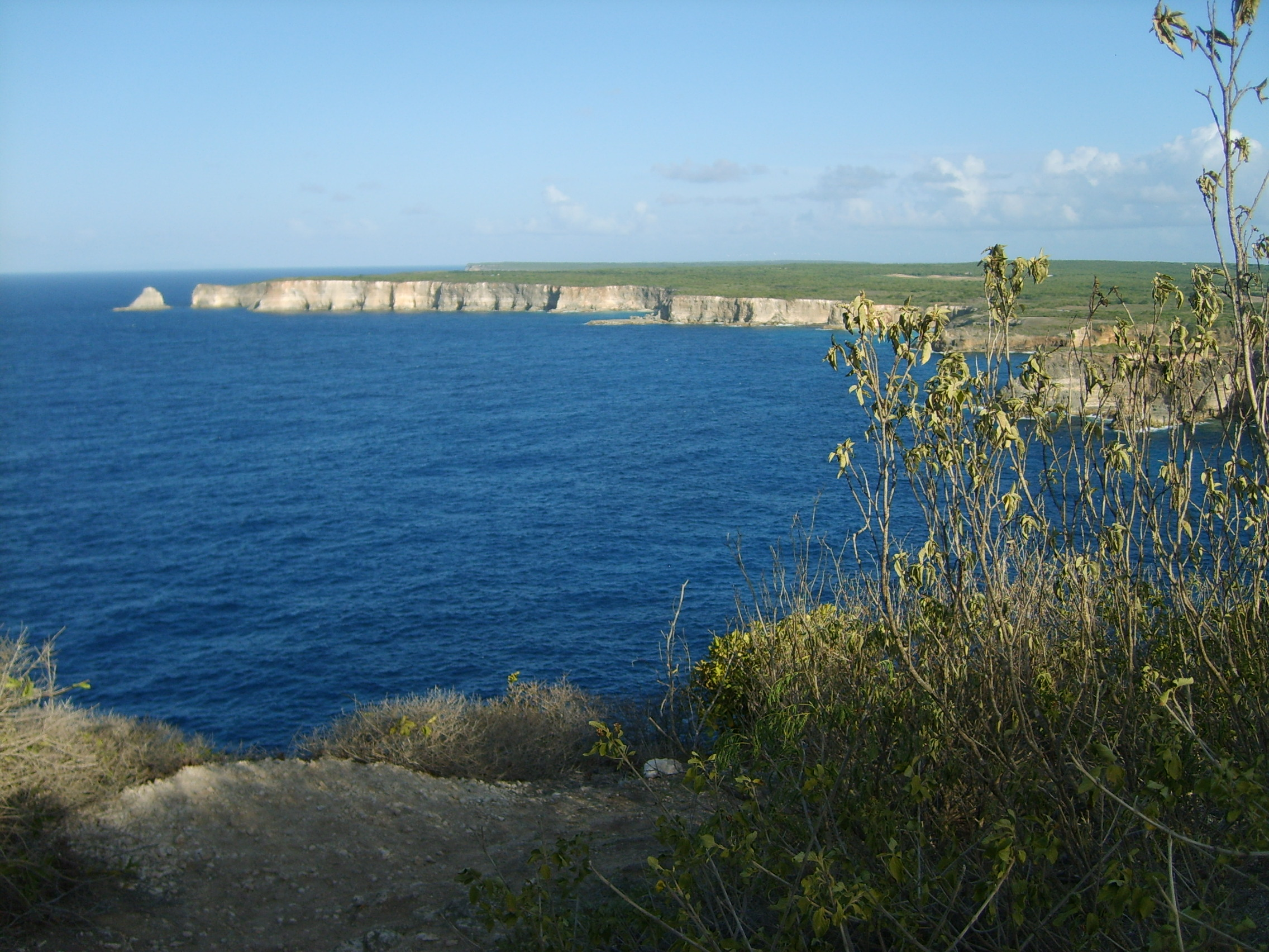 Pointe de la Grande-Vigie située sur la partie nord de l’île de la Guadeloupe en Grande-Terre, à l’Anse-Bertrand (Guadeloupe, France).